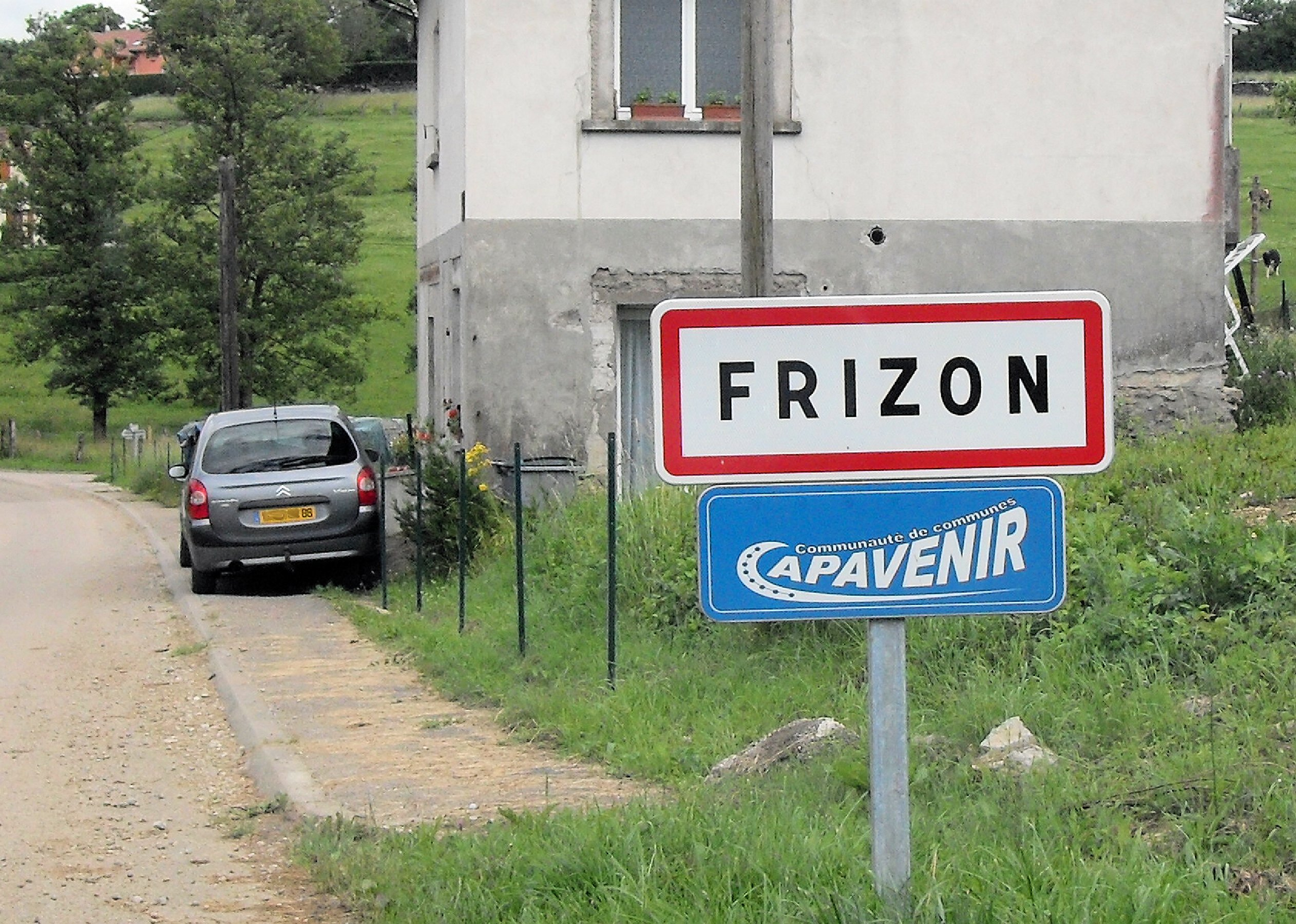 panneau d'entrée de Frizon